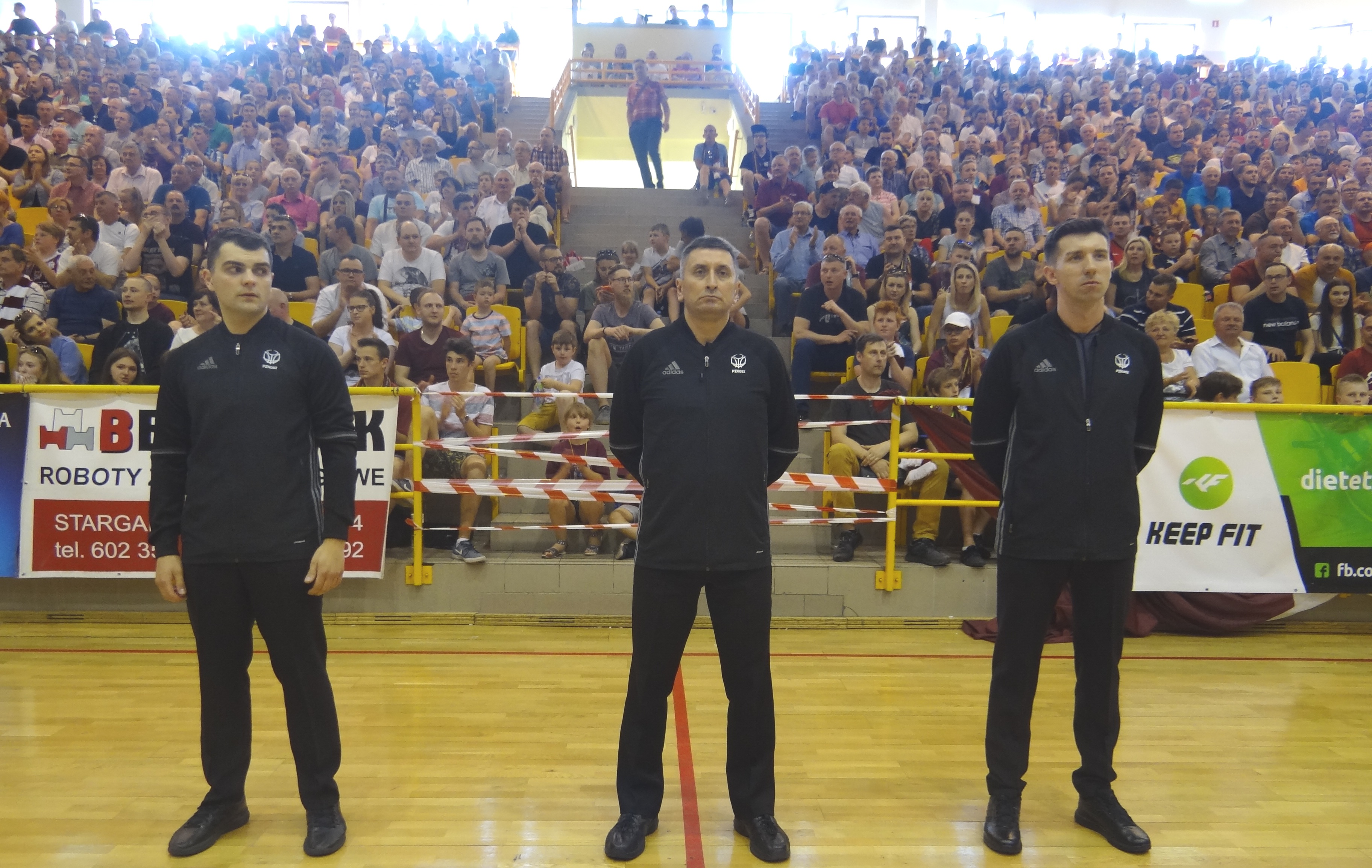 Sędziowie meczu Spójnia - Sokół (13.05.2018)